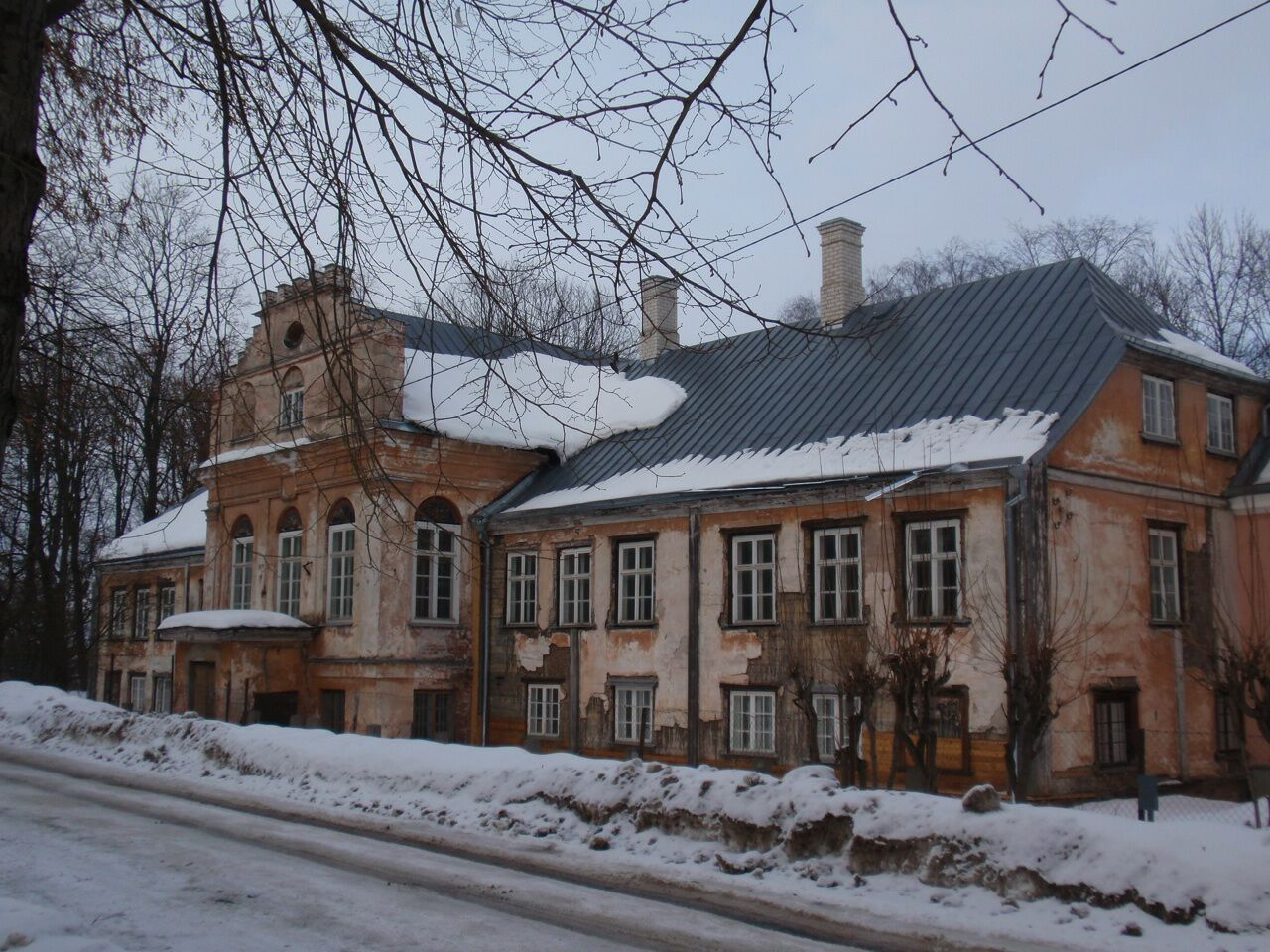 Karlova mõis Tartus.